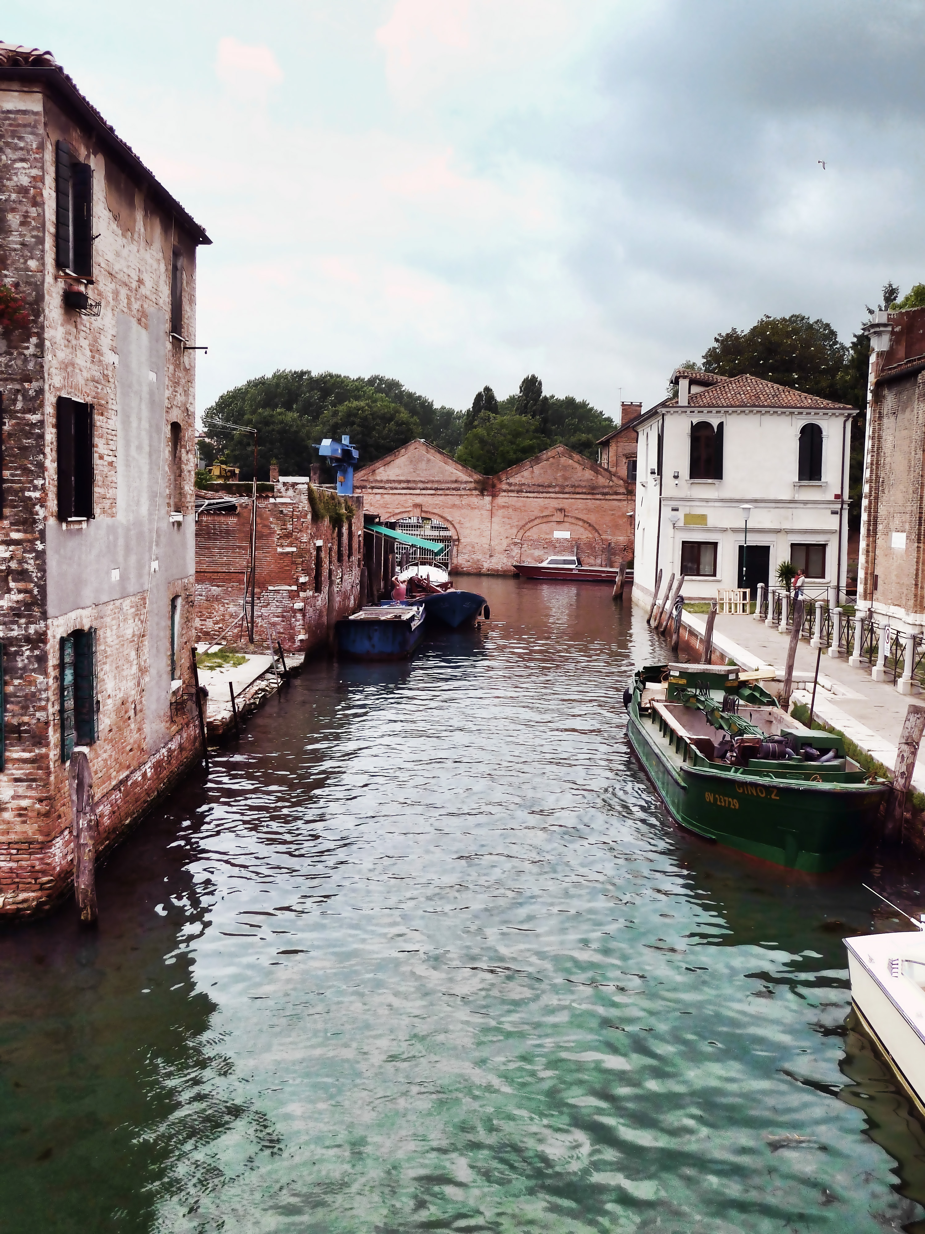 Rio di Santa Maria Maggiore (Venice)